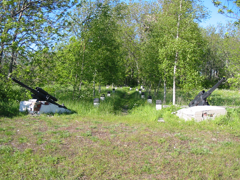 Siim Sepp, 2003